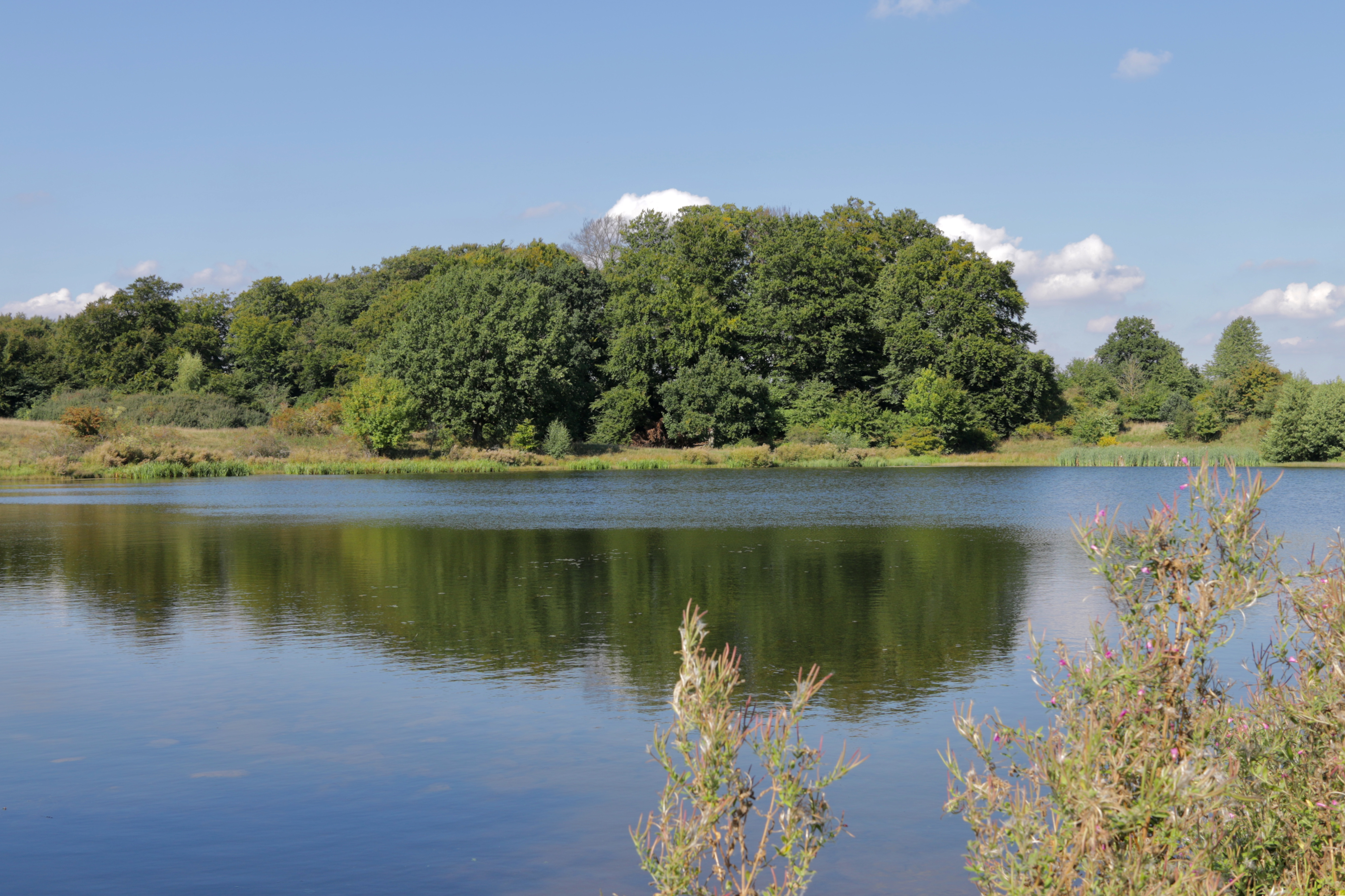 Ållskogs naturreservat 1